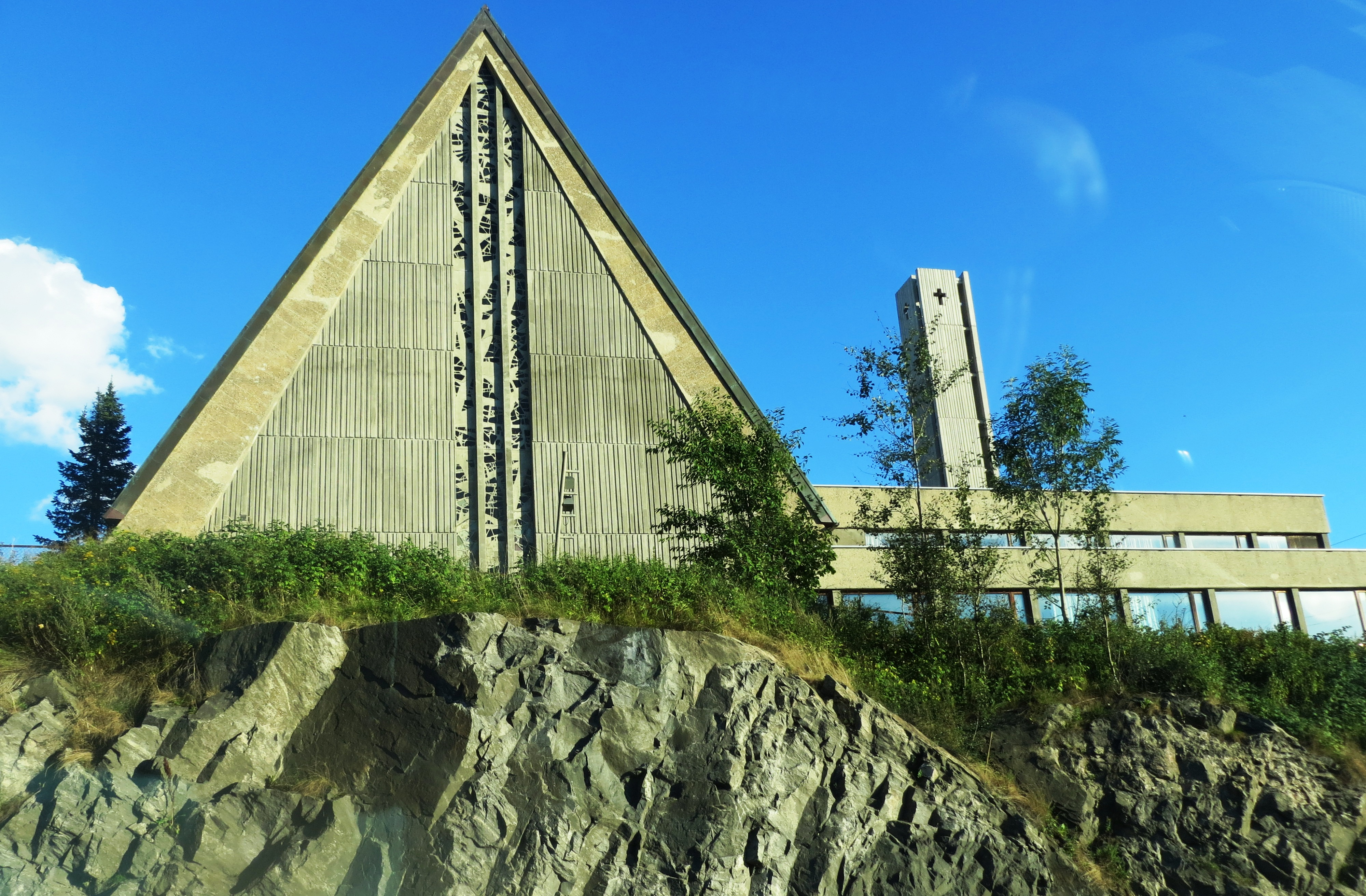 Manglerud kirke, Ryen (Oslo)